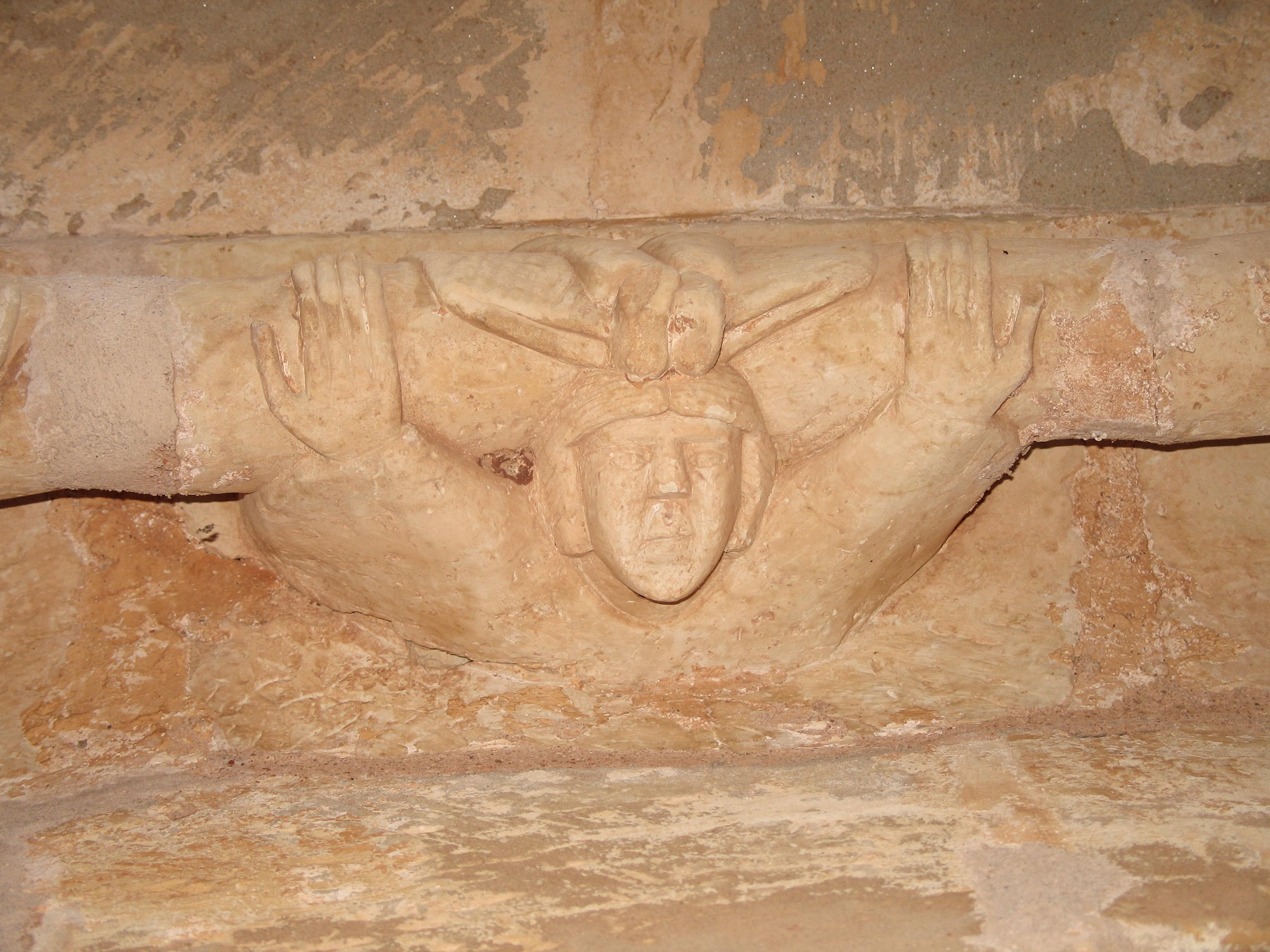 Contorsionista en la portada románica de la iglesia de Santa María del Val. Atienza (Guadalajara, España)